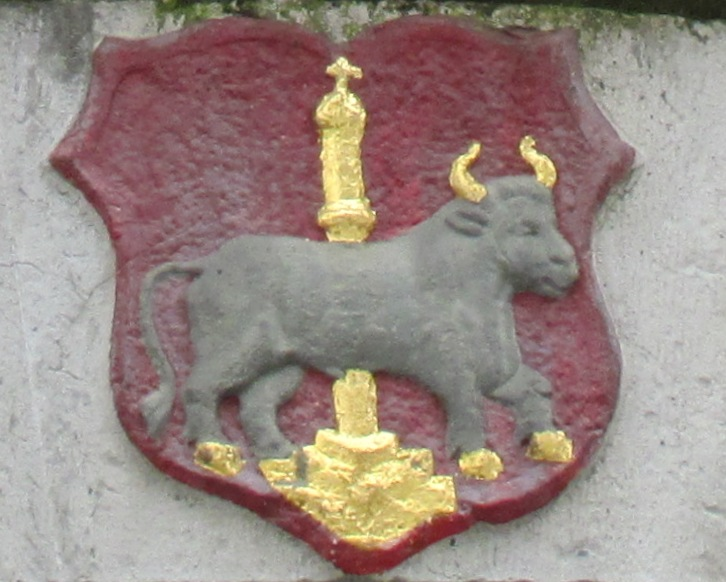 Blason des mangons situé sur la halle aux viandes